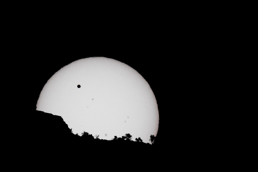 گذر ناهید(زهره) به پدیده عبور سیاره ناهید از مقابل قرص خورشید گفته می‌شود. که قابل ذکر است این پدیده یعنی گذر زهره از دید ناظر زمینی است و زمانی رخ می دهد که زمین , زهره و خورشید در یک راستا قرار گیرند .